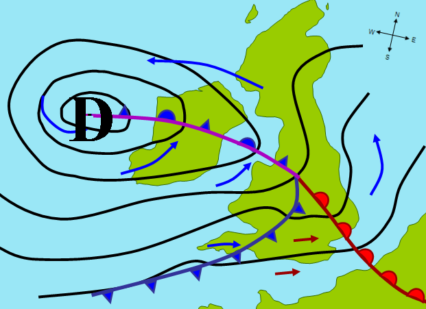 Schéma d'une dépression avec ses fronts.